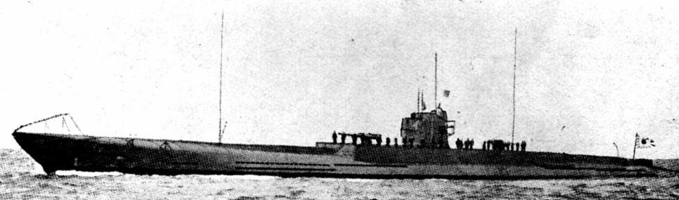 伊号第一潜水艦 (I-1 submarine)